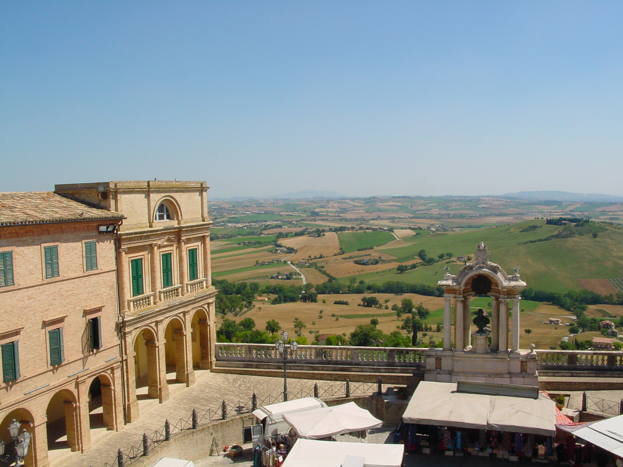 Sistemazione della Piazza del Comune di Treia ad opera dell'arch. Andrea Vici